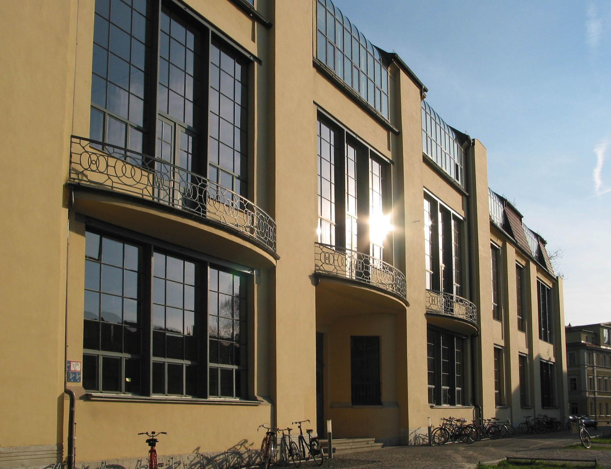 Nordfassade des Hauptgebäudes der Bauhaus-Universität Weimar (früheres Kunstschulgebäude), das Gebäude wurde 1904-1911 nach den Entwürfen des belgischen Architekten Henry van de Velde für die "Großherzoglich-Sächsische Hochschule für bildende Kunst" errichtet und wurde von 1919 bis 1925 vom "Staatlichen Bauhaus zu Weimar" genutzt, heute ist es Sitz der Fakultät Architektur sowie Hauptgebäude der Bauhaus-Universität Weimar und gehört seit 1996 zum Weltkulturerbe der UNESCO.